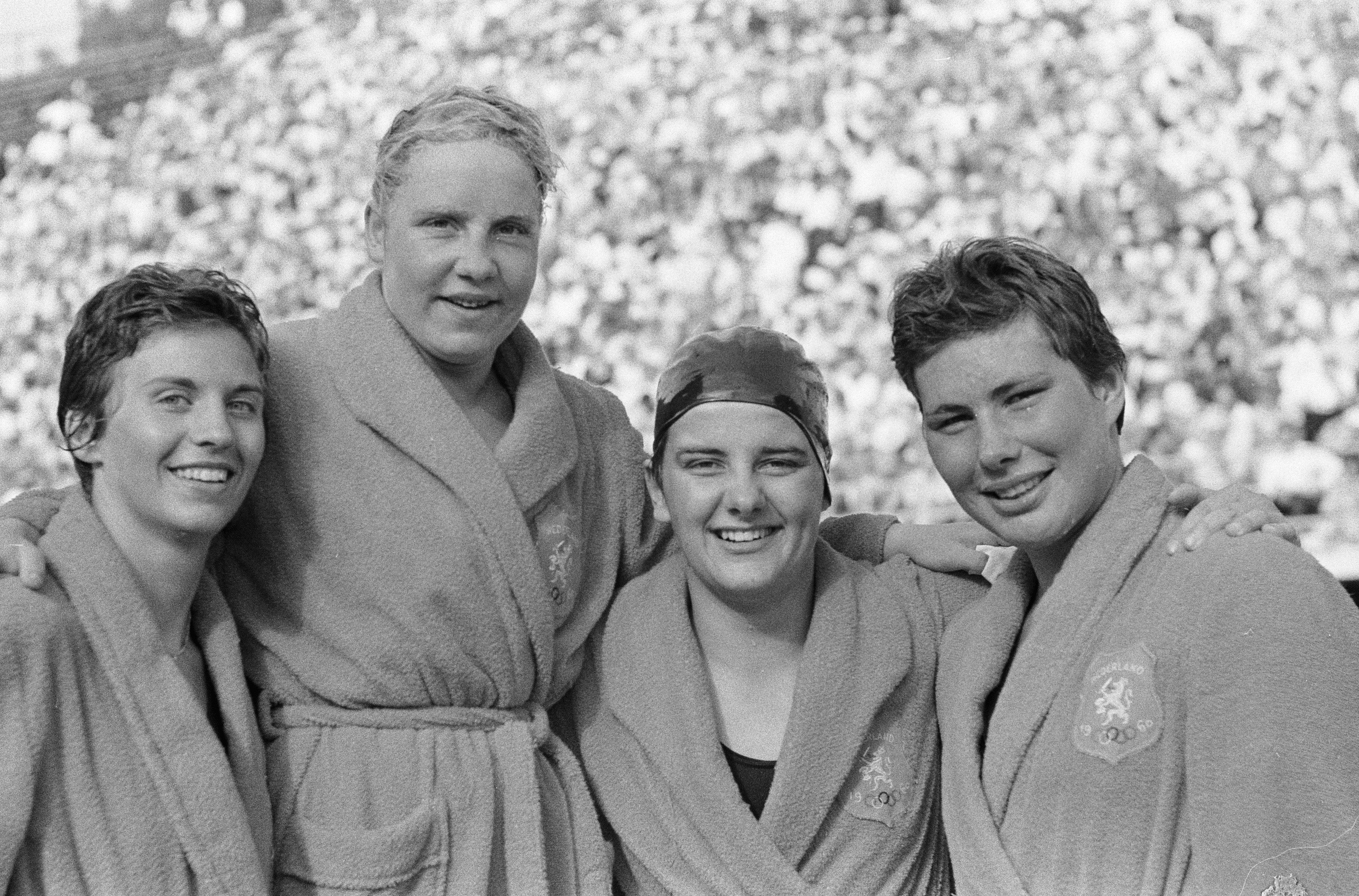 Collectie / Archief : Fotocollectie Anefo Reportage / Serie : [ onbekend ] Beschrijving : Olympische Spelen te Rome. In de series van de 4x100 meter wisselslag estafette vestigde de Nederlandse ploeg een Olympisch record. V.l.n.r. Ria van Velsen, Tineke Lagerberg, Erica Terpstra en Ada den Haan Datum : 11 september 1960 Locatie : Italië, Rome Trefwoorden : sport, zwemmen Persoonsnaam : Haan, Ada den, Lagerberg, Tineke, Terpstra, Erica, Velsen, Ria van Fotograaf : Pot, Harry / Anefo Auteursrechthebbende : Nationaal Archief Materiaalsoort : Negatief (zwart/wit) Nummer archiefinventaris : bekijk toegang 2.24.01.05 Bestanddeelnummer : 911-5839